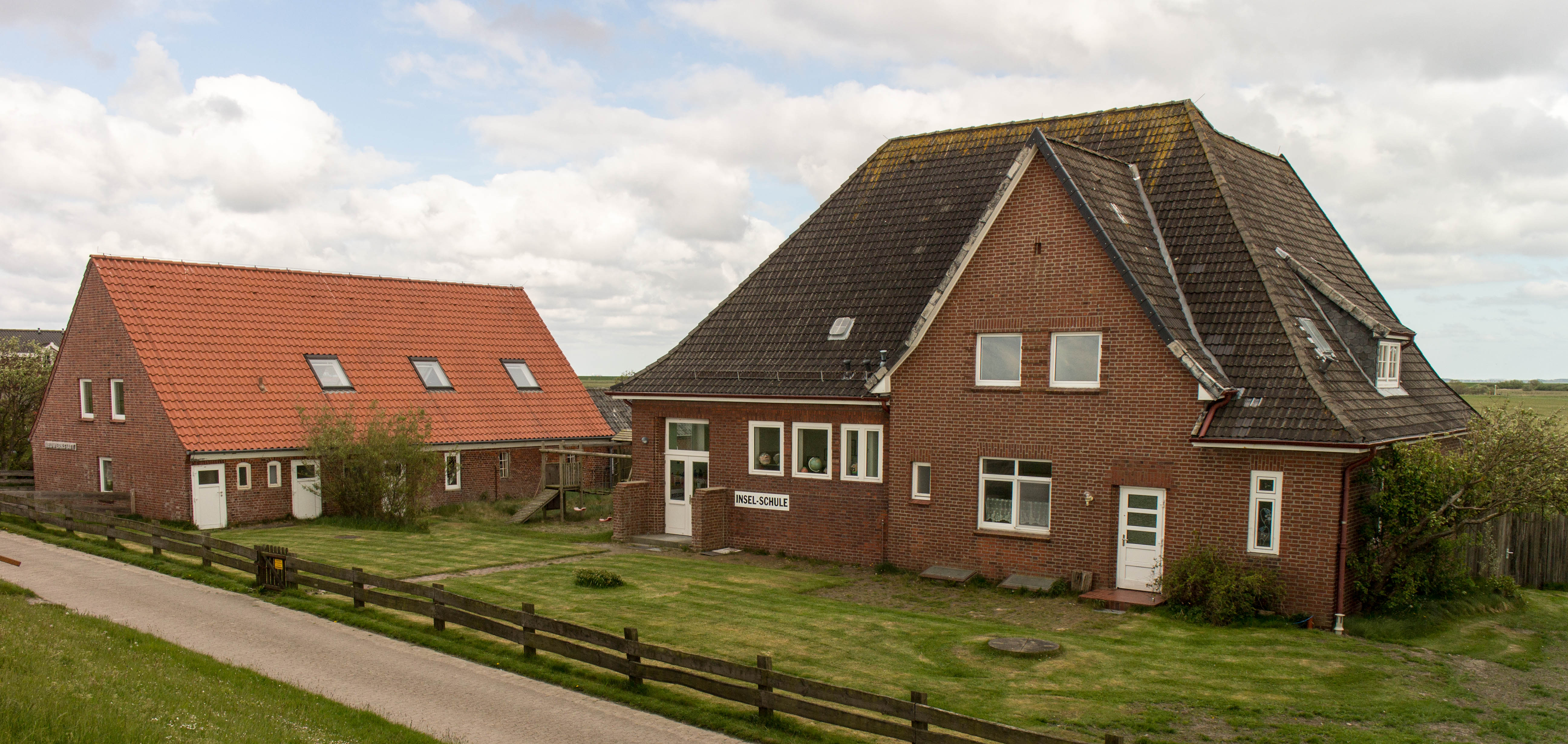 Ensemble aus Blüsenhaus und dem Neuwerker Schulgebäude. Ehemaliger Standort des Kleinen Leuchtturms.